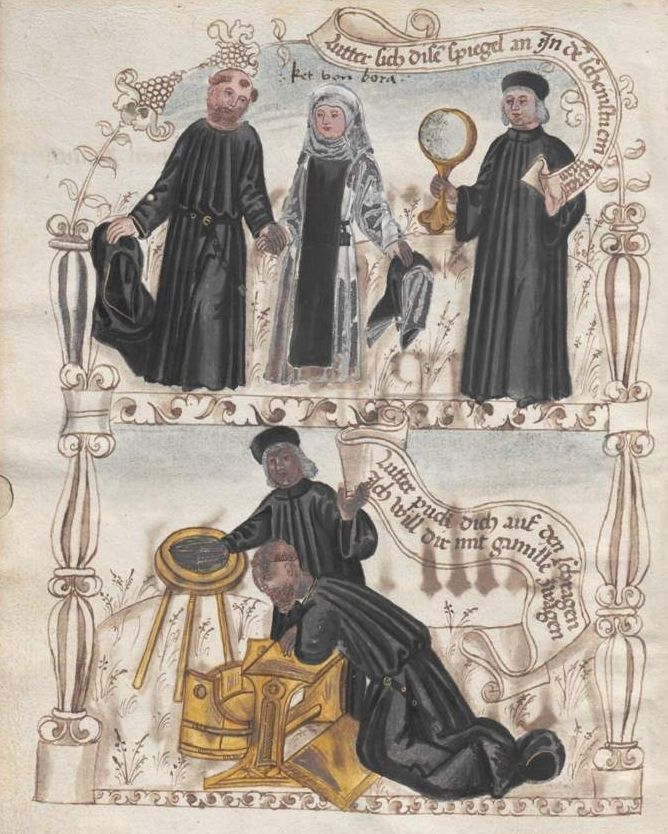 Titelbild von Kilian Leib: Luthers Bad (1526) in BSB München Cgm 6551